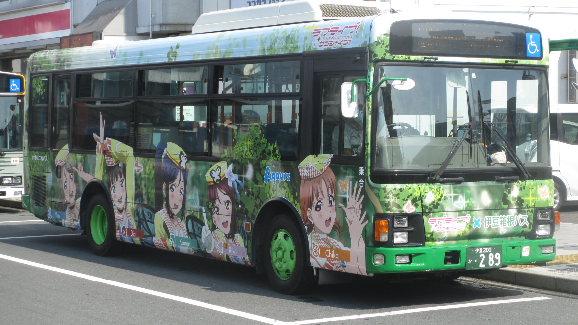 伊豆箱根バス 三島営業所 所属 伊豆200か・289 元・西武バス 大宮営業所 大宮200か1368→西武観光バス 秩父営業所 所沢200か1672